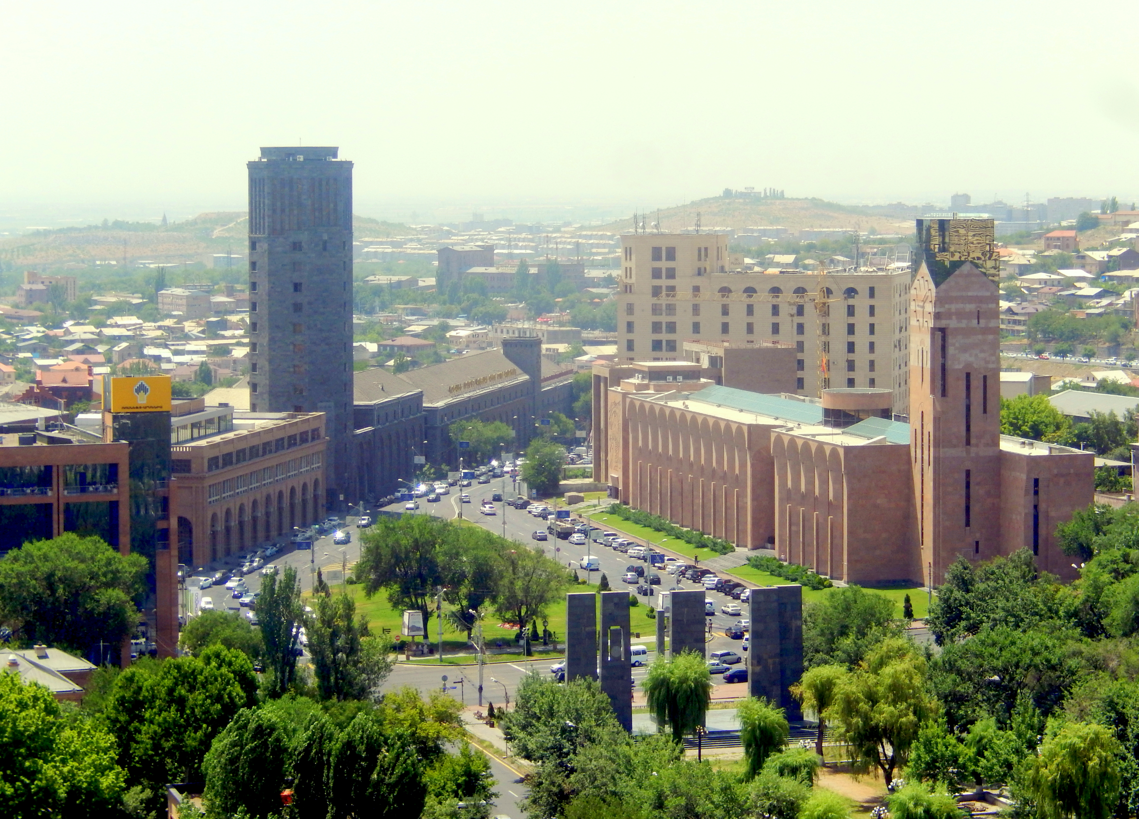 Yerevan City Hall, vodka & brandy factory